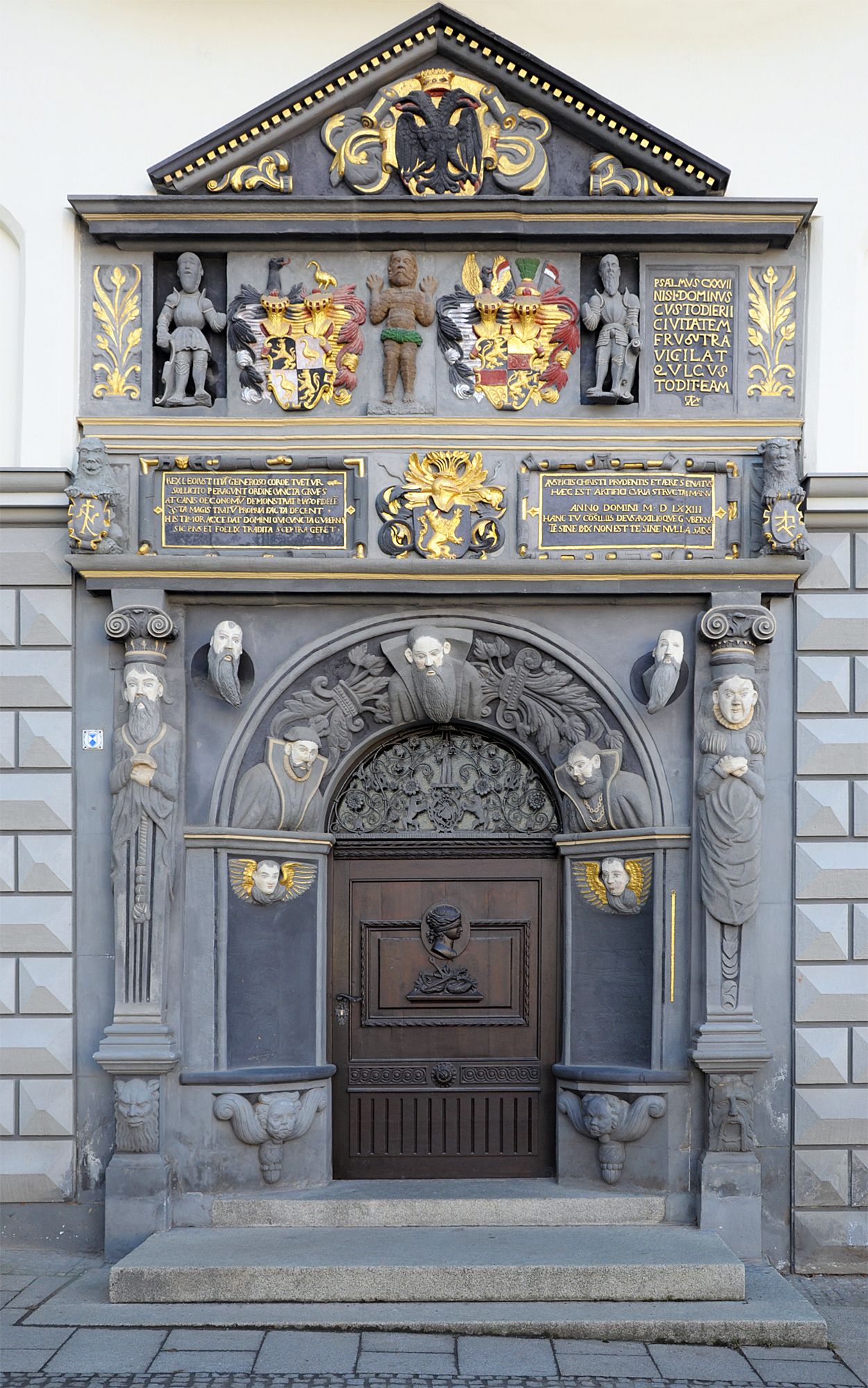 Portal des Geraer Rathauses